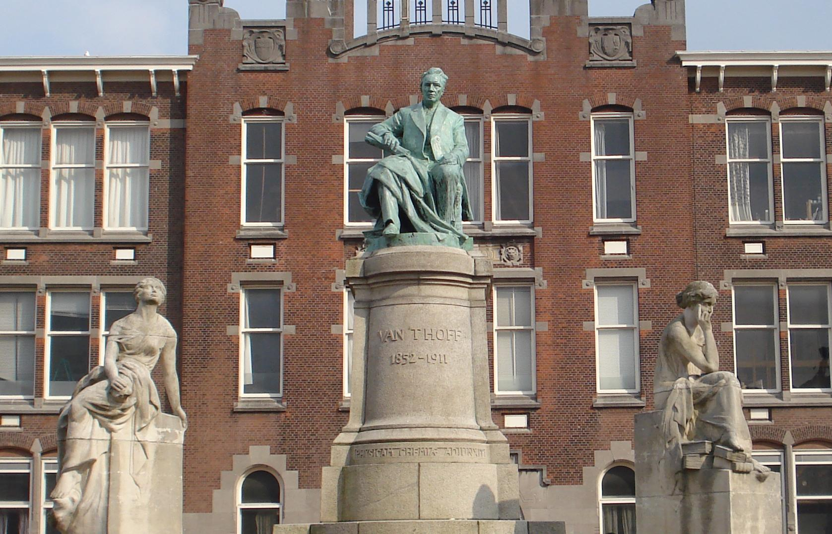 Rotterdam, 's Gravendijkwal. Monument nobelprijswinnaar Van 't Hoff.